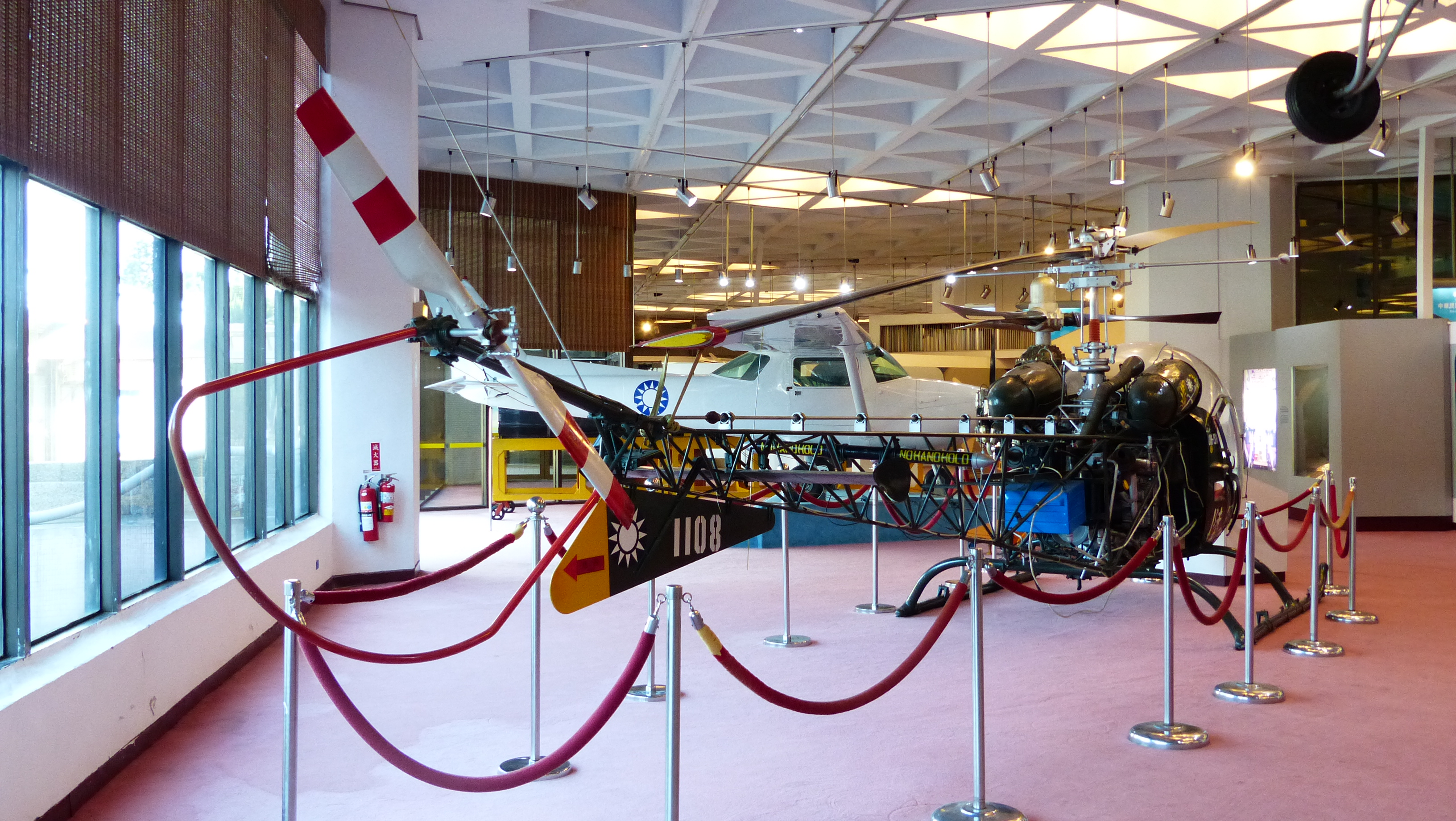 右後方所見陸軍OH-13H 1108。